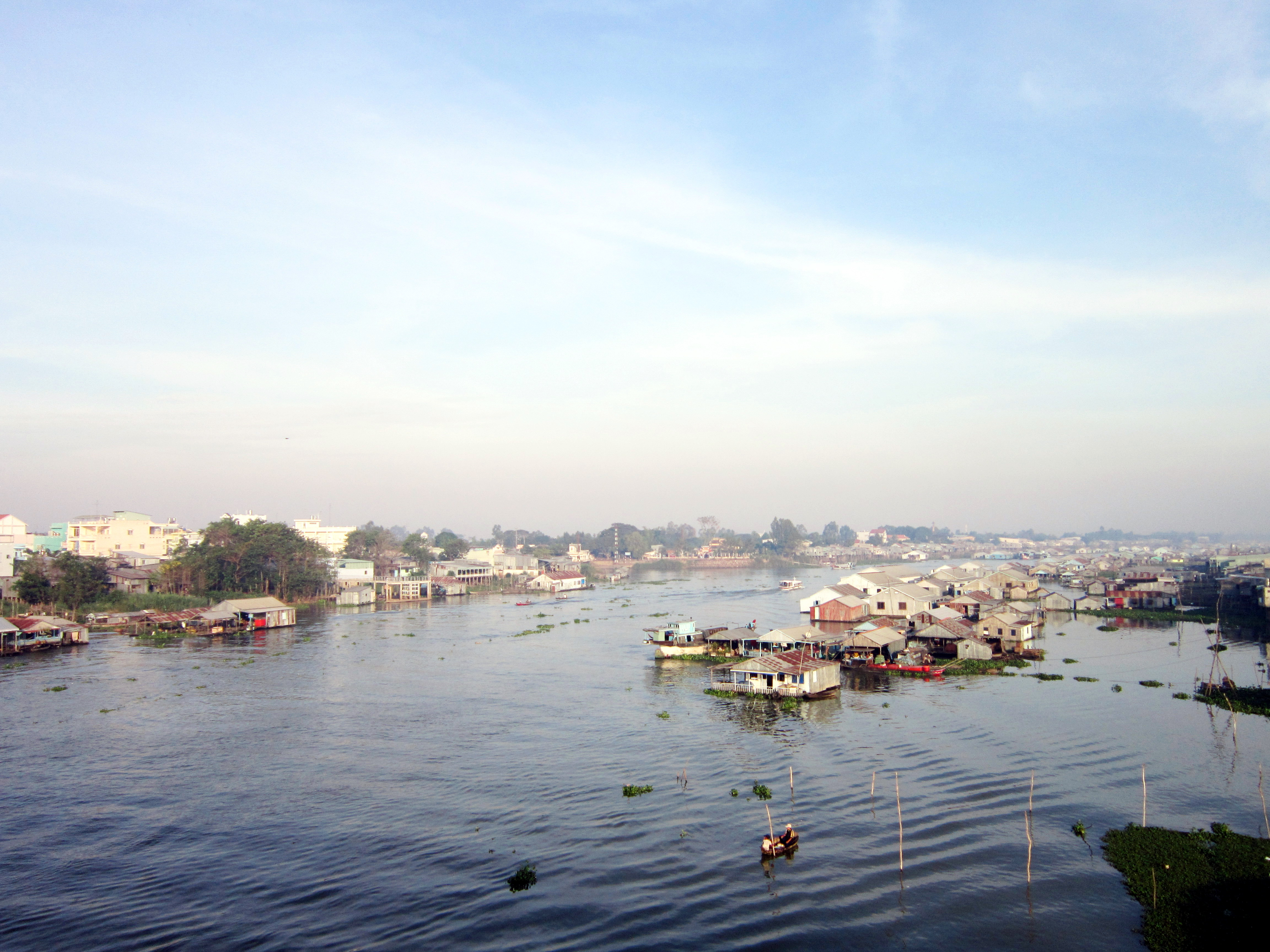 Sông Châu Đốc (An Giang, Việt Nam), đoạn chảy qua cầu Cồn Tiên.